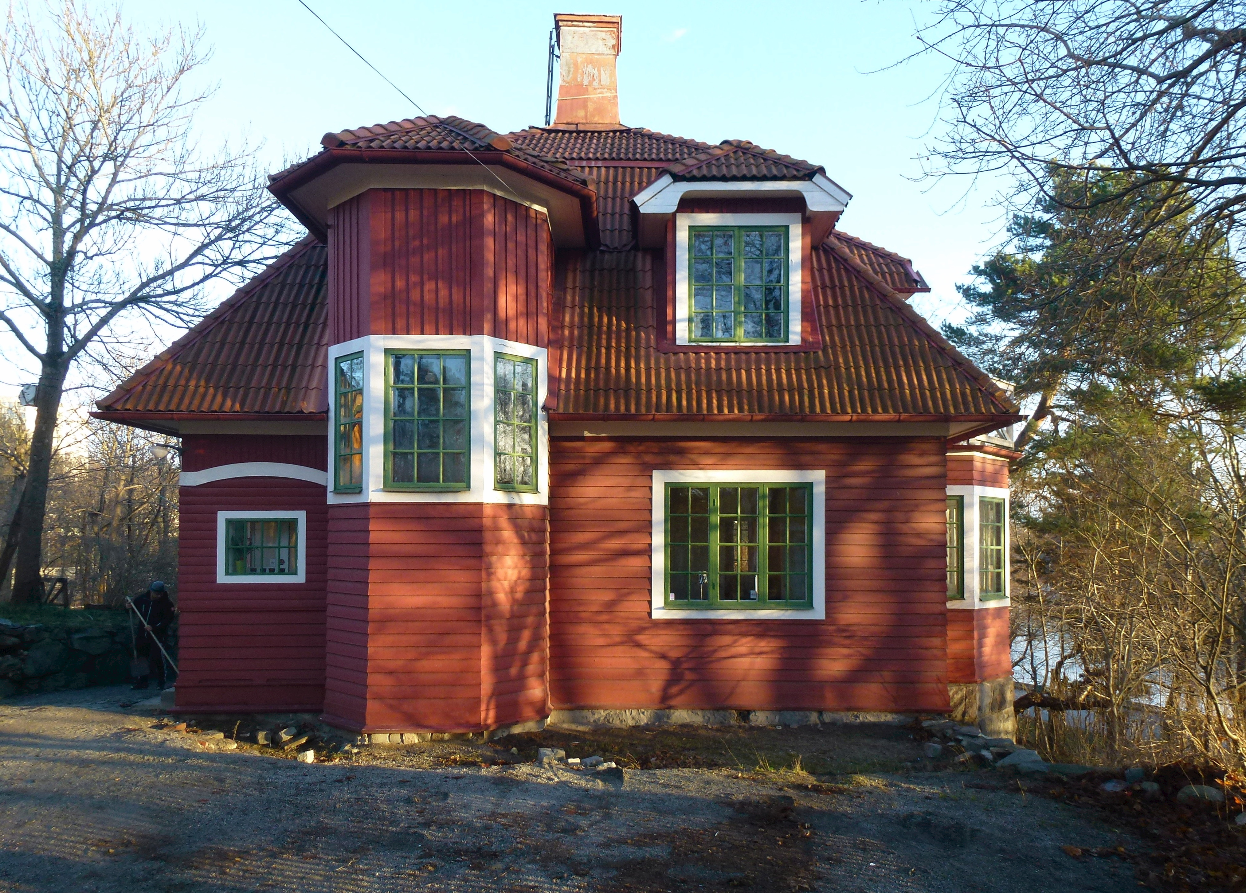 Villa Tomtebo, Sjötorpsvägen 14, arkitekt Gustaf Hugo Sandberg